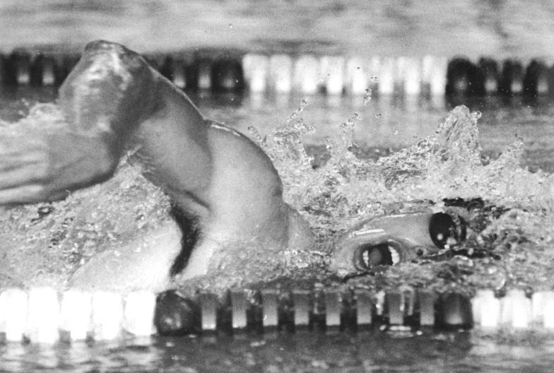 Dresden, Schwimmer Jörg Hoffmann ADN-Hiekel 27.5.90 Dresden-Schwimmen-DDR-Meisterschaften- Ansehnliche 15;13,29 erreichte Jörg Hoffmann (ASK Vorwärts Potsdam) am letzten Wettkampftag des diesjährigen DDR-Schwimm-Championats über 1.500 Meter Freistil. Abgebildete Personen: Hoffmann, Jörg: Schwimmer, DDR